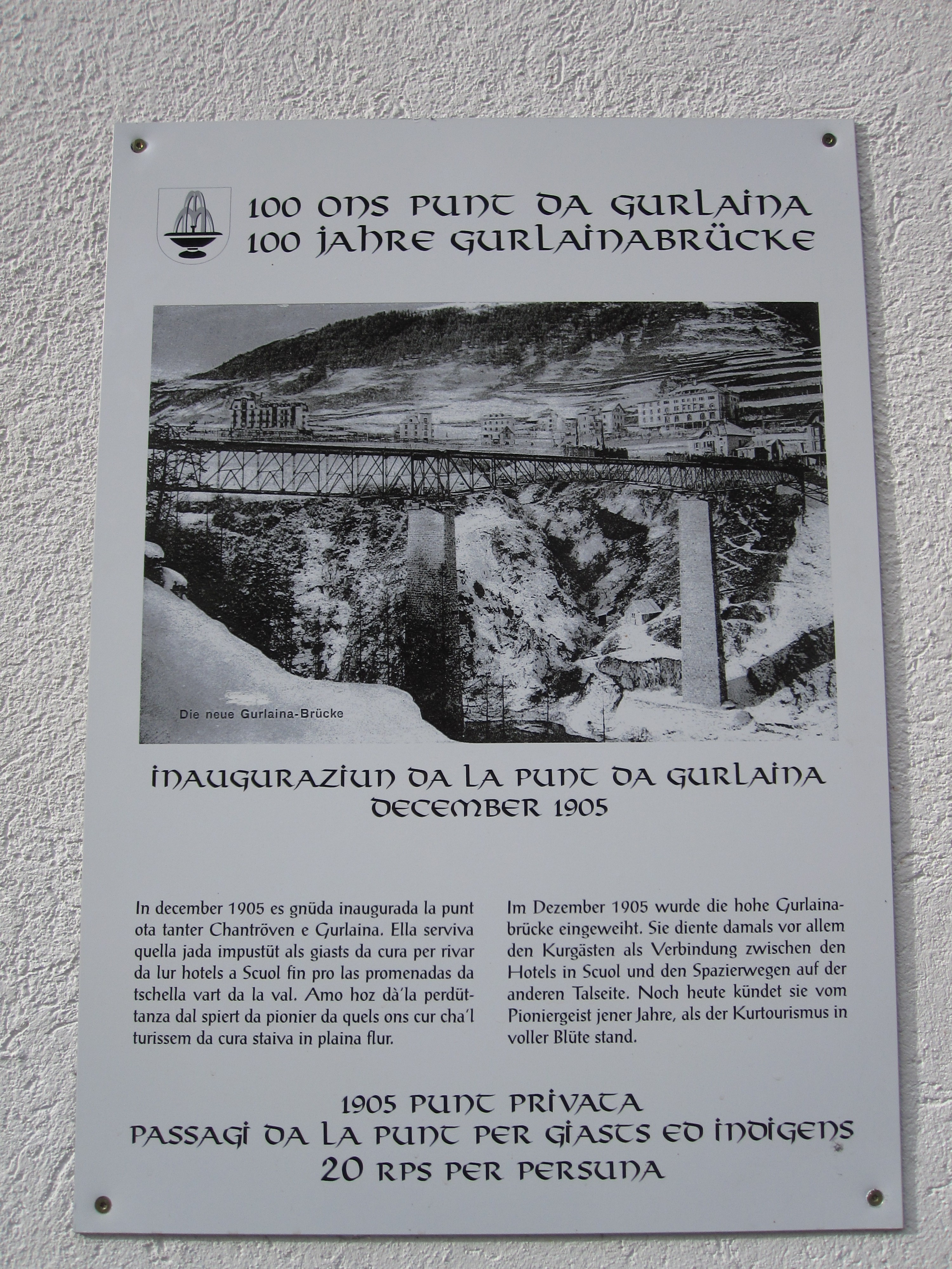 Informationstafel bei der Gurlainabrücke in Scuol (Kanton Graubünden)